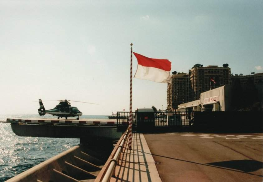 Heliport Monaco 2